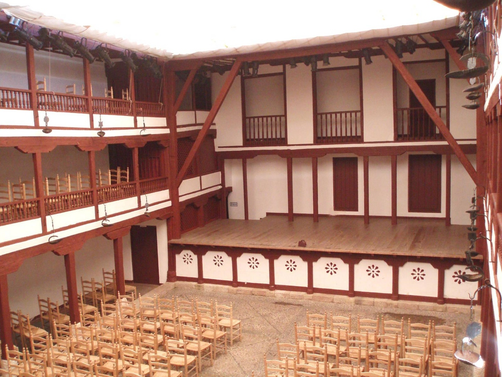 Situado en la Plaza Mayor es Monumento Nacional desde 1955 y es el único conservado íntegramente de los de su clase y época.